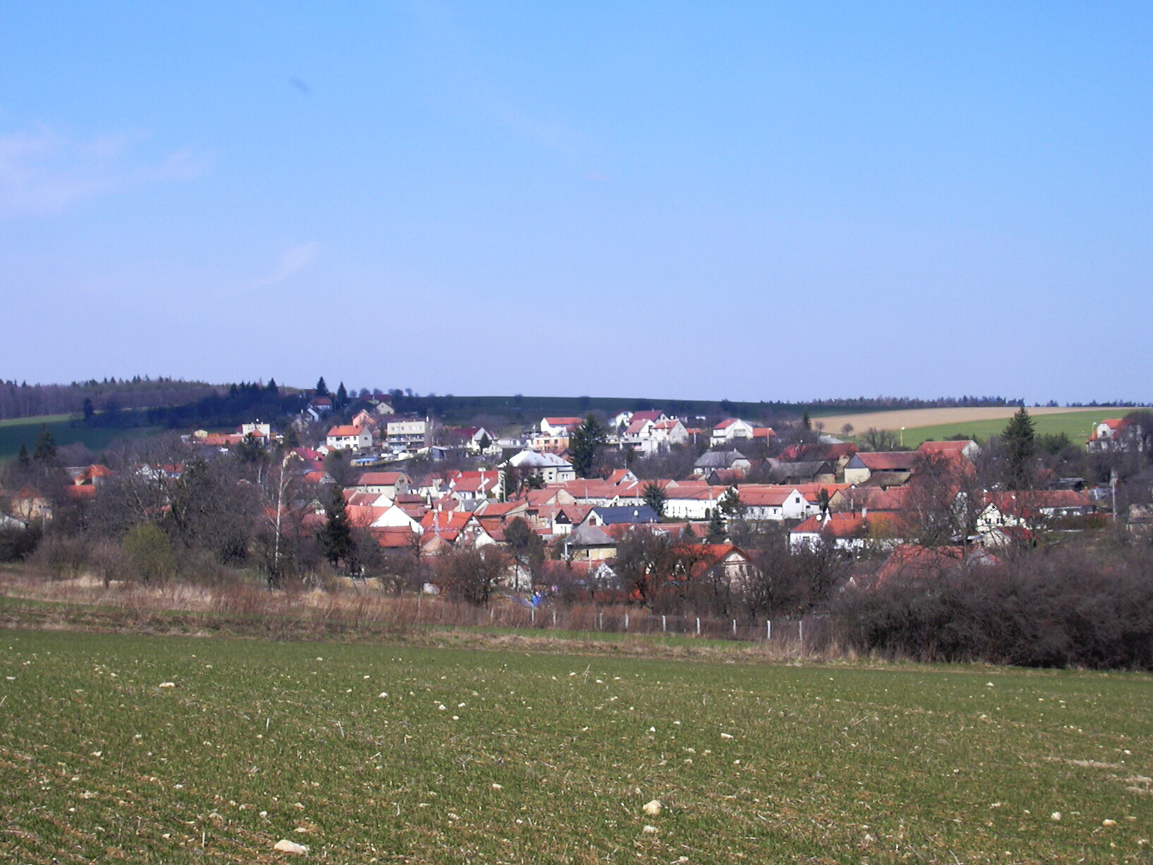 celkový pohled Ježkovice (Vyškov- Czech republic)